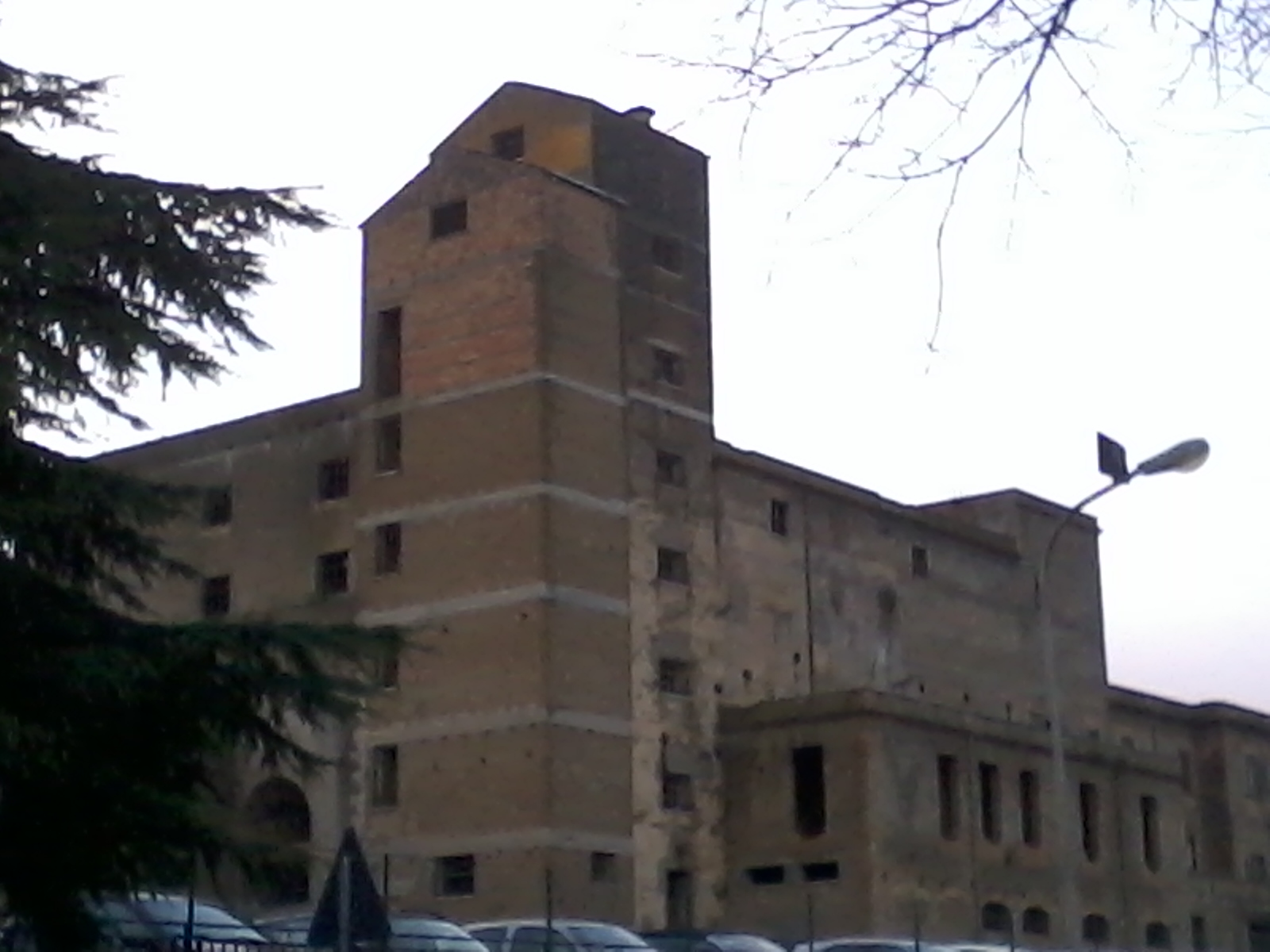 Il convento di Sant'Antonio Abate a Cisterna di Latina